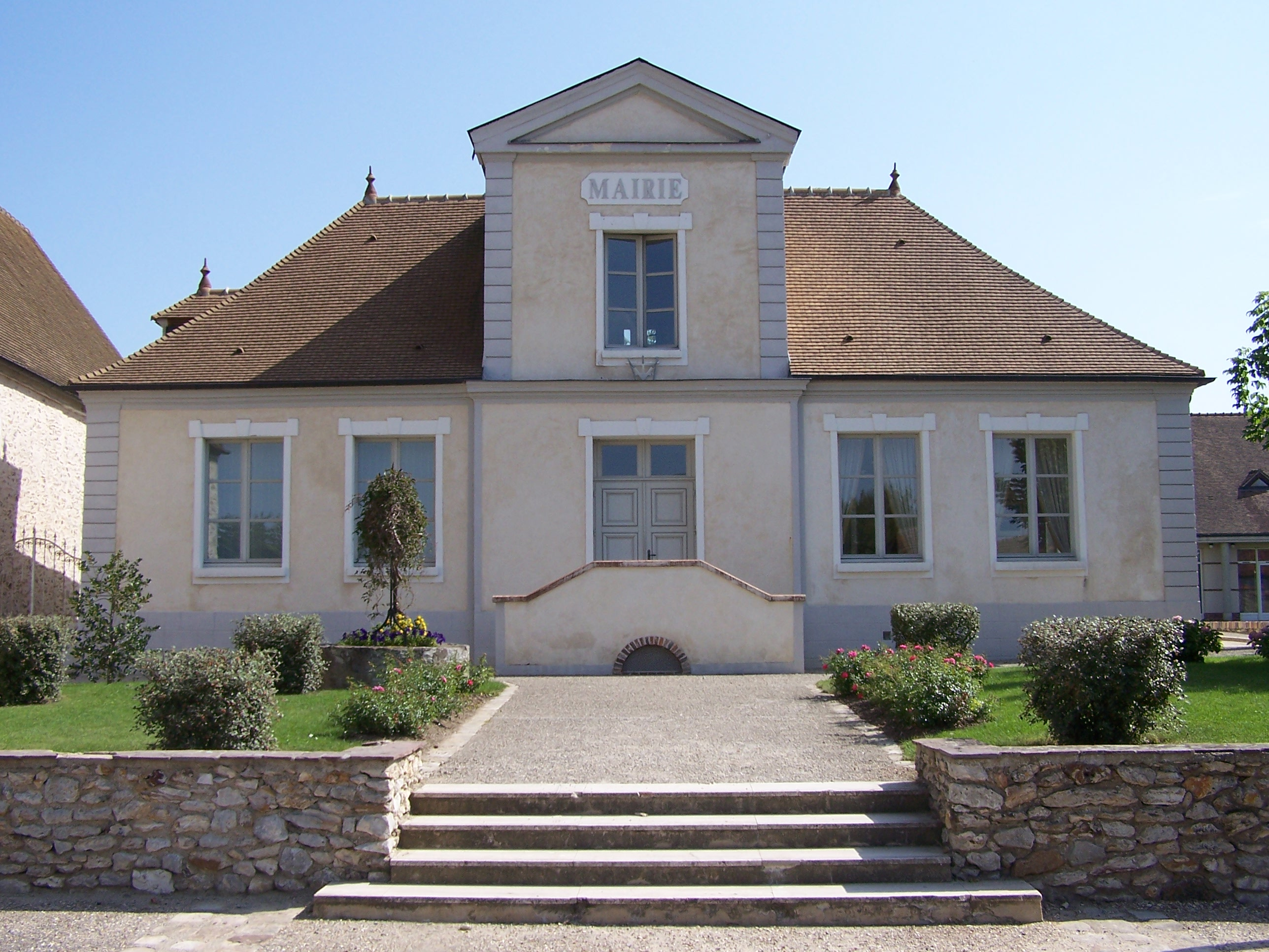 Mairie de Béhoust (Yvelines, France)